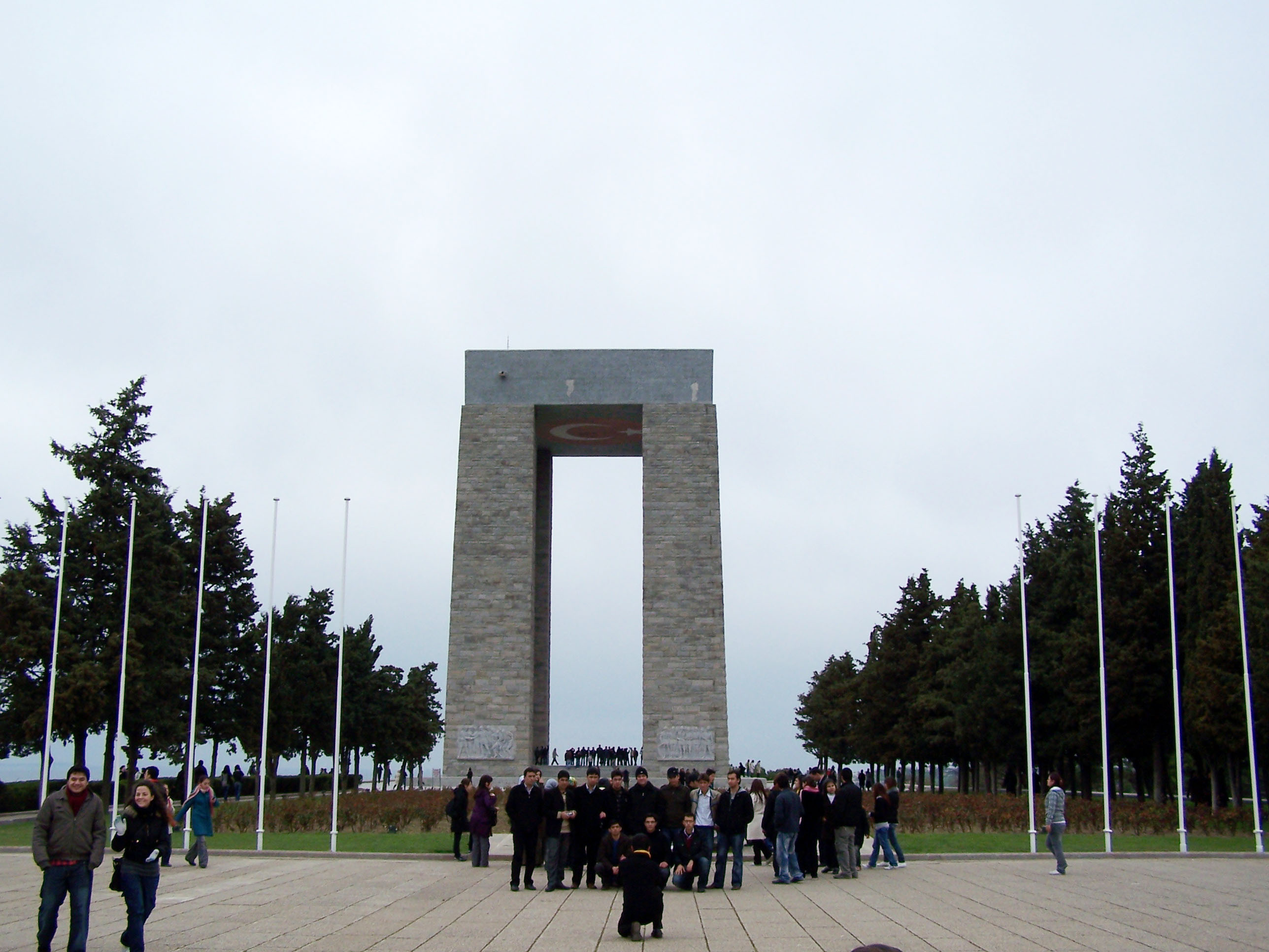 Şehitler Abidesi in Çanakkale, Turkey